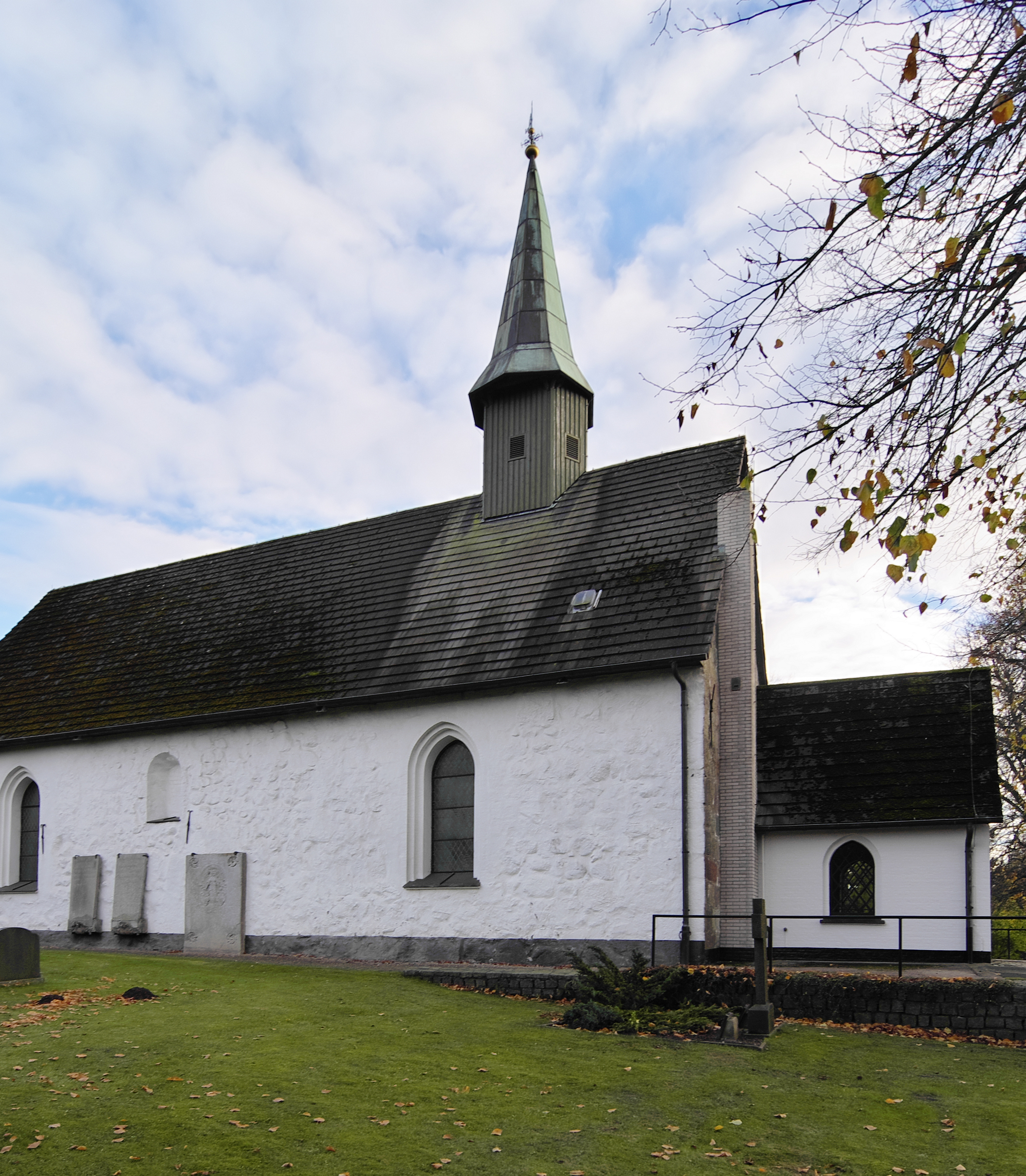 St. Marien in Tolk, Kreis Schleswig-Flensburg.